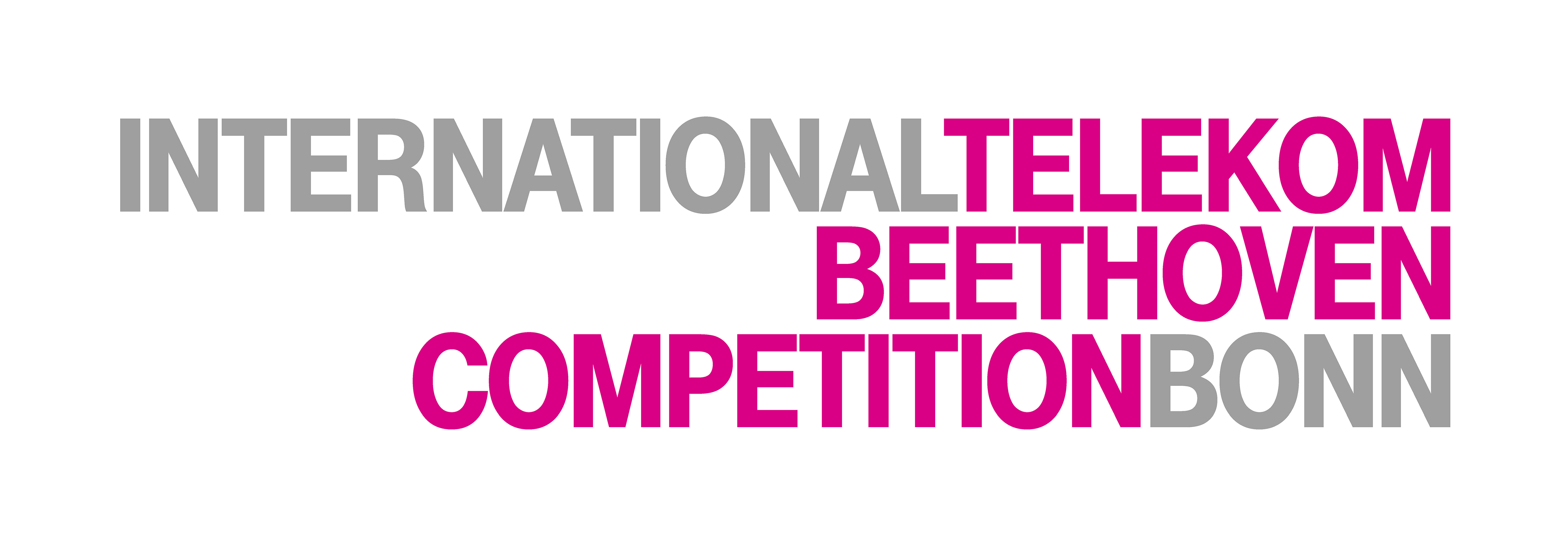 Logo der International Telekom Beethoven Competition Bonn